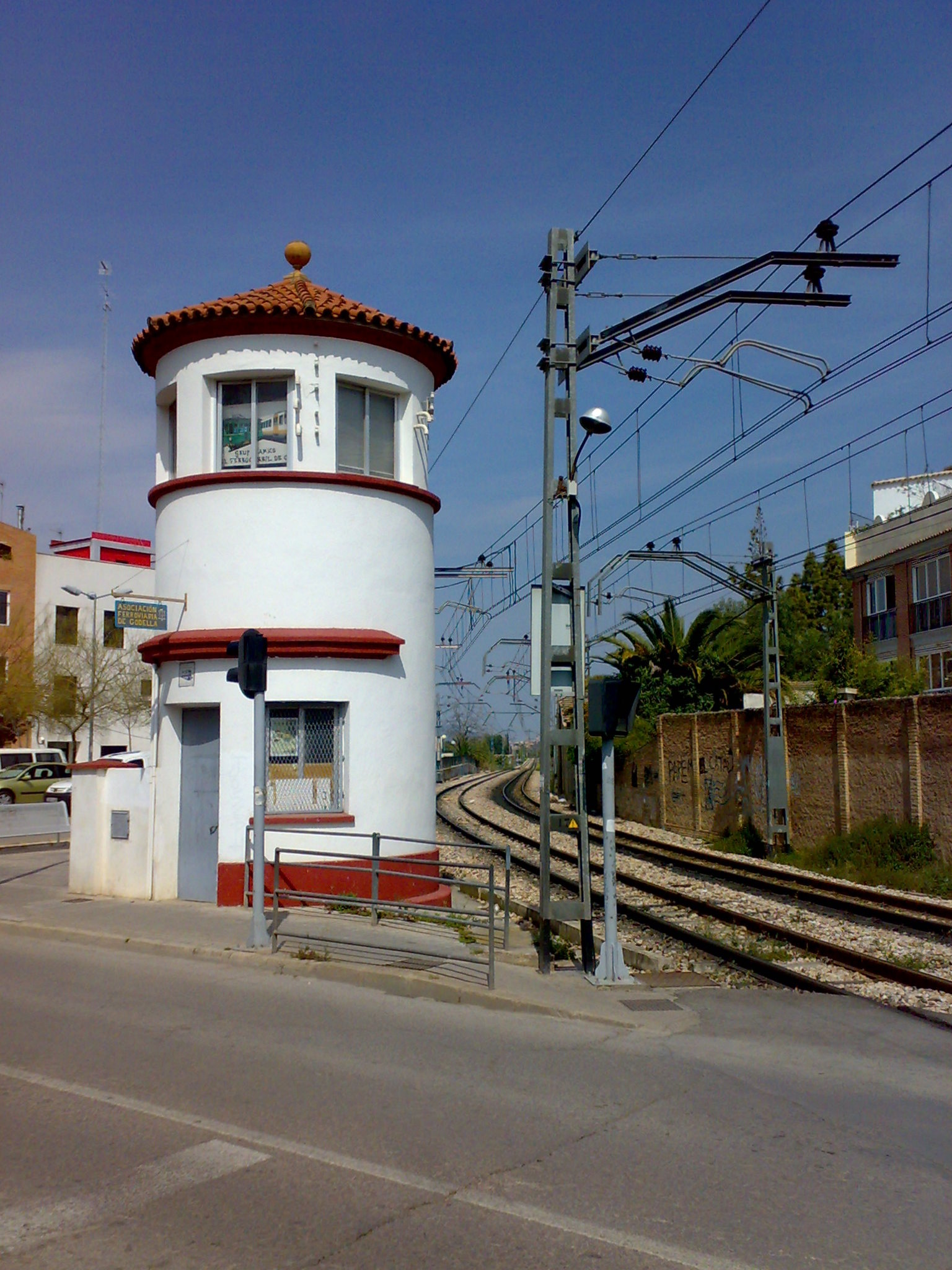 Edificio de la Asociación Ferroviaria de Godella (Valencia)